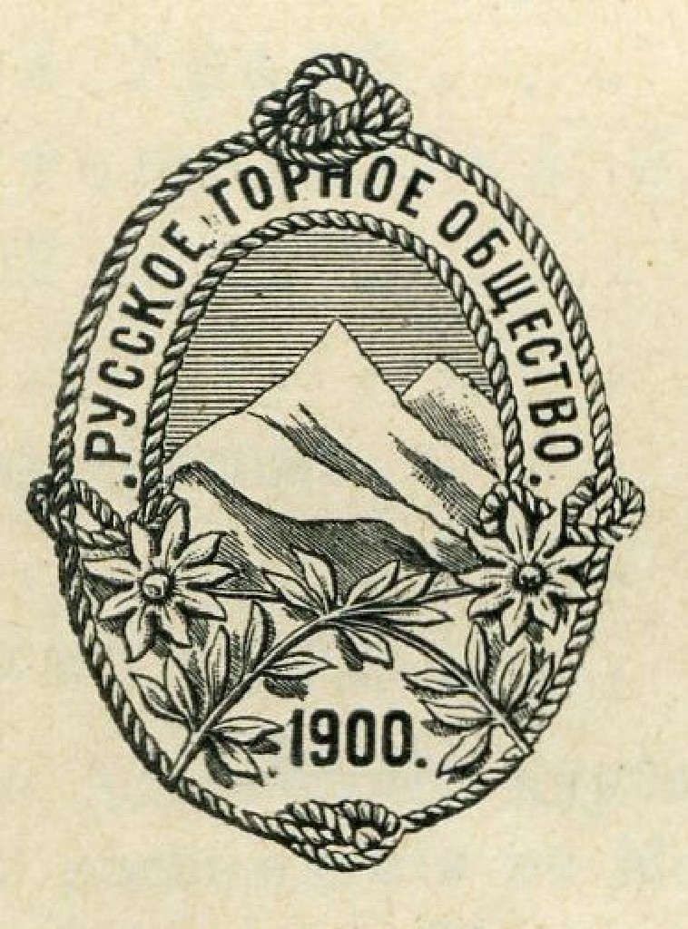 Значок Русского горного общества, созданного в России в 1900 году